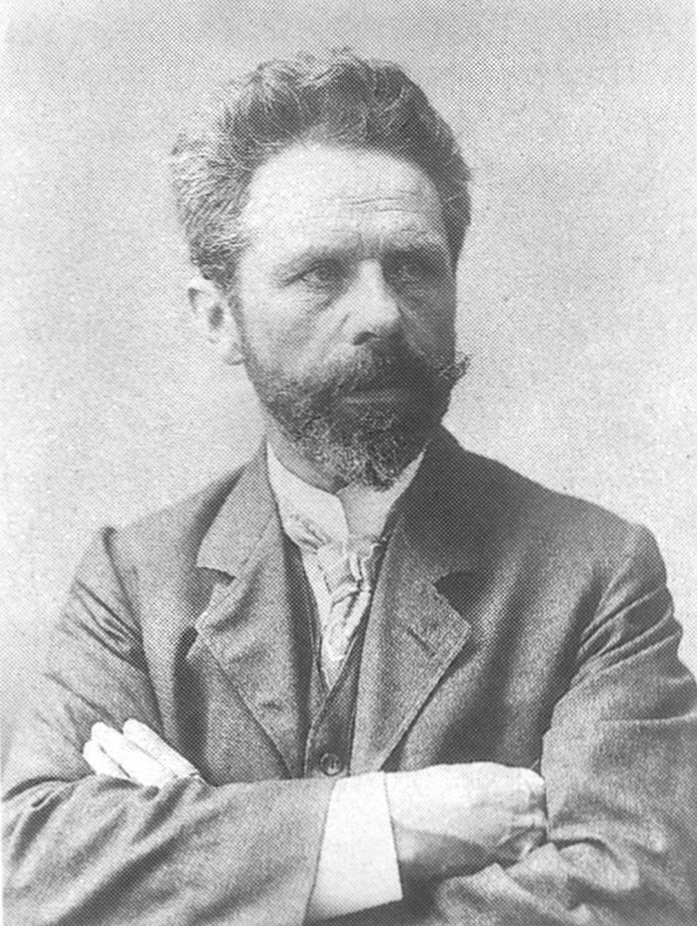 Brustbild von Georg Rheineck mit gekreuzten Armen.